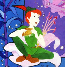 Peter Pan - Affiche de la 87ème fête des fleurs - Luchon (1986)